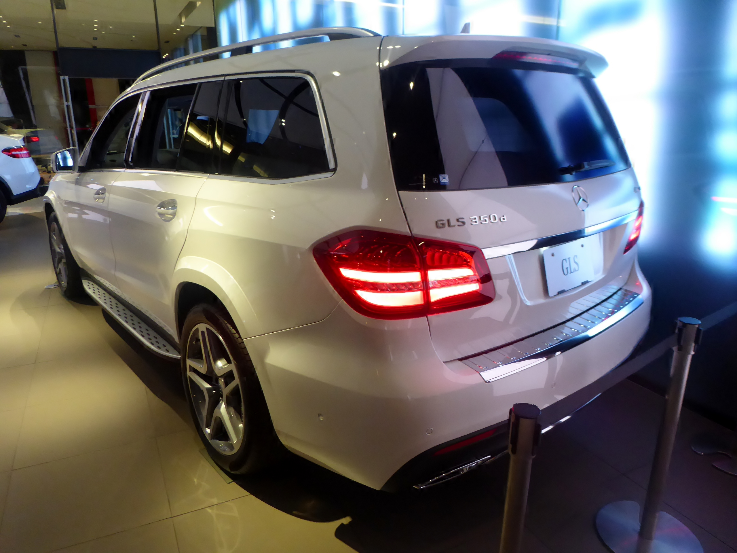 X166型メルセデス・ベンツ・GLS350d 4MATICスポーツをリアから撮影。